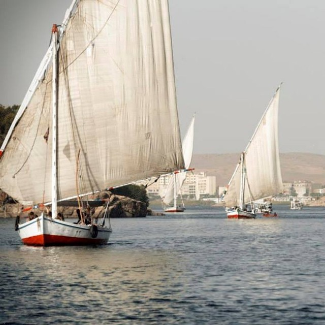 Egypt